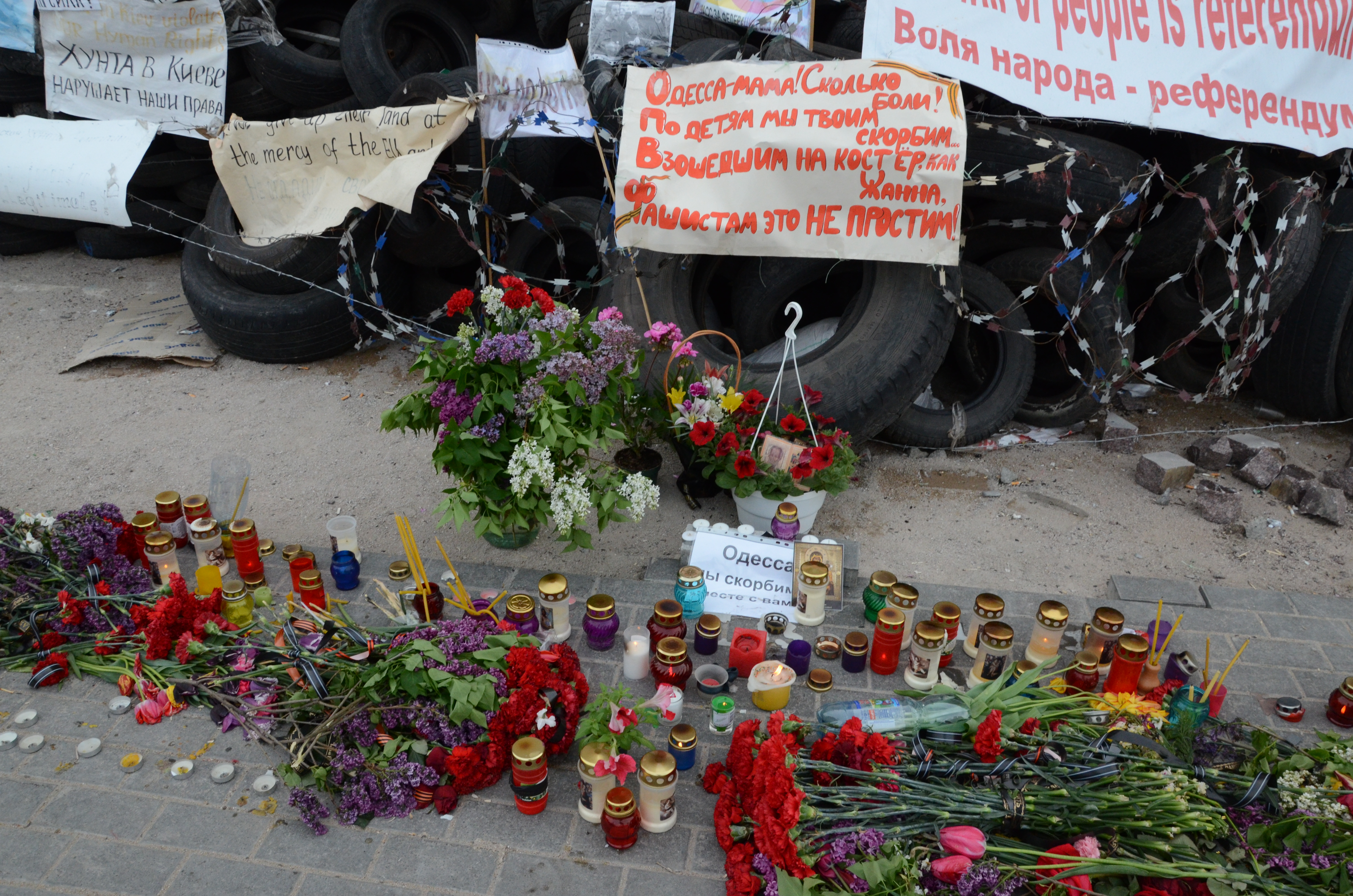 Протесты в Донецке